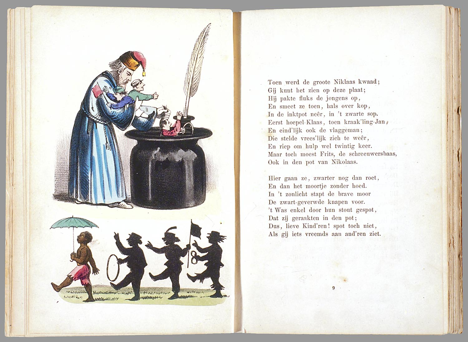 Heruitgave met geheel nieuwe illustraties die met de hand zijn ingekleurd. // Heruitgave 20 p., 16 bl. pl : handgekl. lith // De oorspronkelijke auteur is Heinrich Hoffmann // Datering: niet in Rühle: Böse Kinder, schatting Theo Gielen // De keerzijde van de illustraties is onbedrukt // Bevat 8 verhalen: De geschiedenis van den wreeden Jan ; De geschiedenis van de zwarte jongens ; De geschiedenis van den wilden jager ; De geschiedenis van Soep-Hein ; De geschiedenis van den Duimzuiger ; De allerdroevigste geschiedenis met de zwavelstokjens ; De geschiedenis van Philip, den schommelaar ; Piet de smeerpoets // Bewerking van de 2e Duitse versie van Der Struwwelpeter uit 1858 Prentenboeken // Rijmvertellingen // Smeerpoetsverhalen // Waarschuwingsverhalen